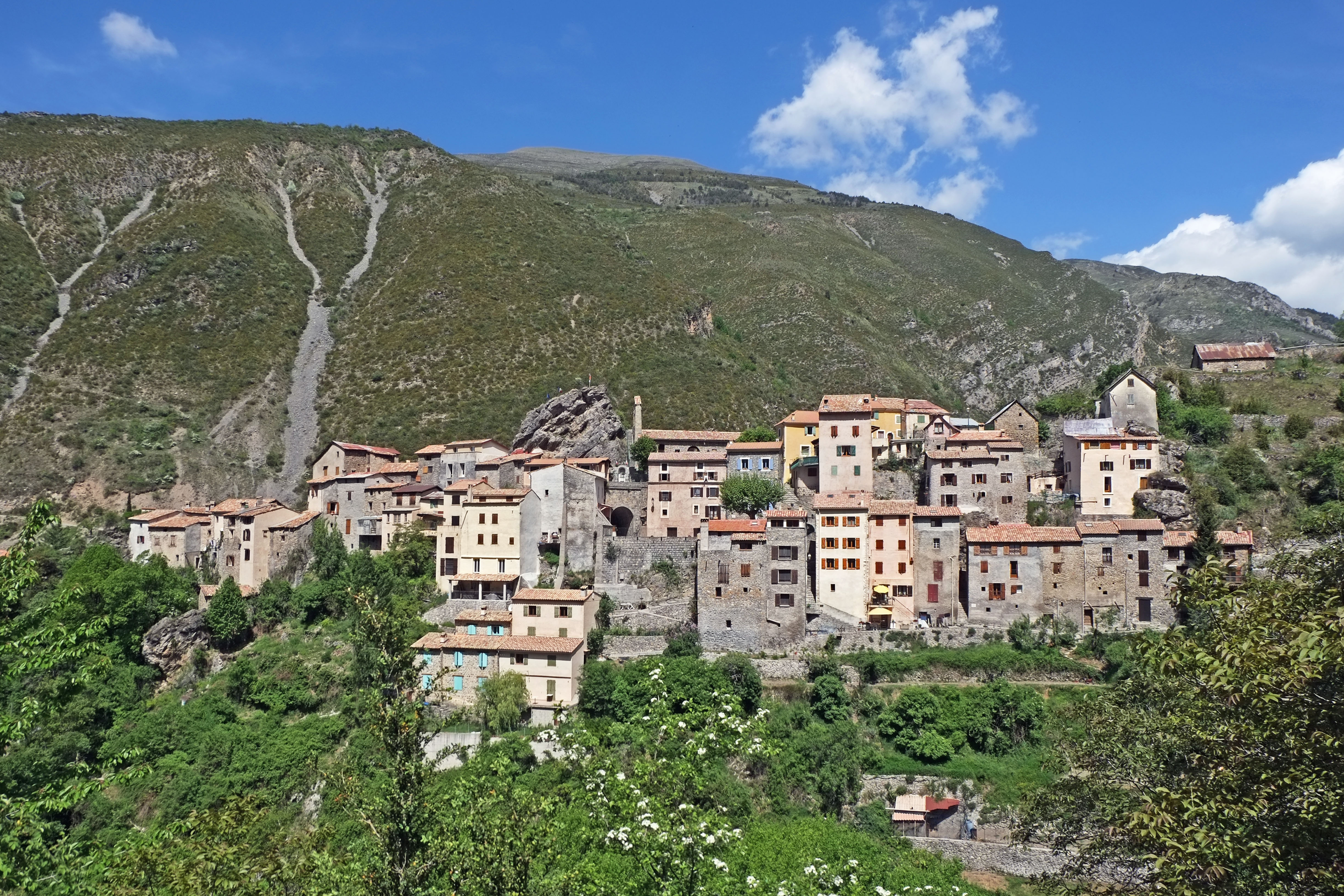 Vue du village de Pierlas depuis le flanc sud du vallon de Coulié (au printemps).JPG